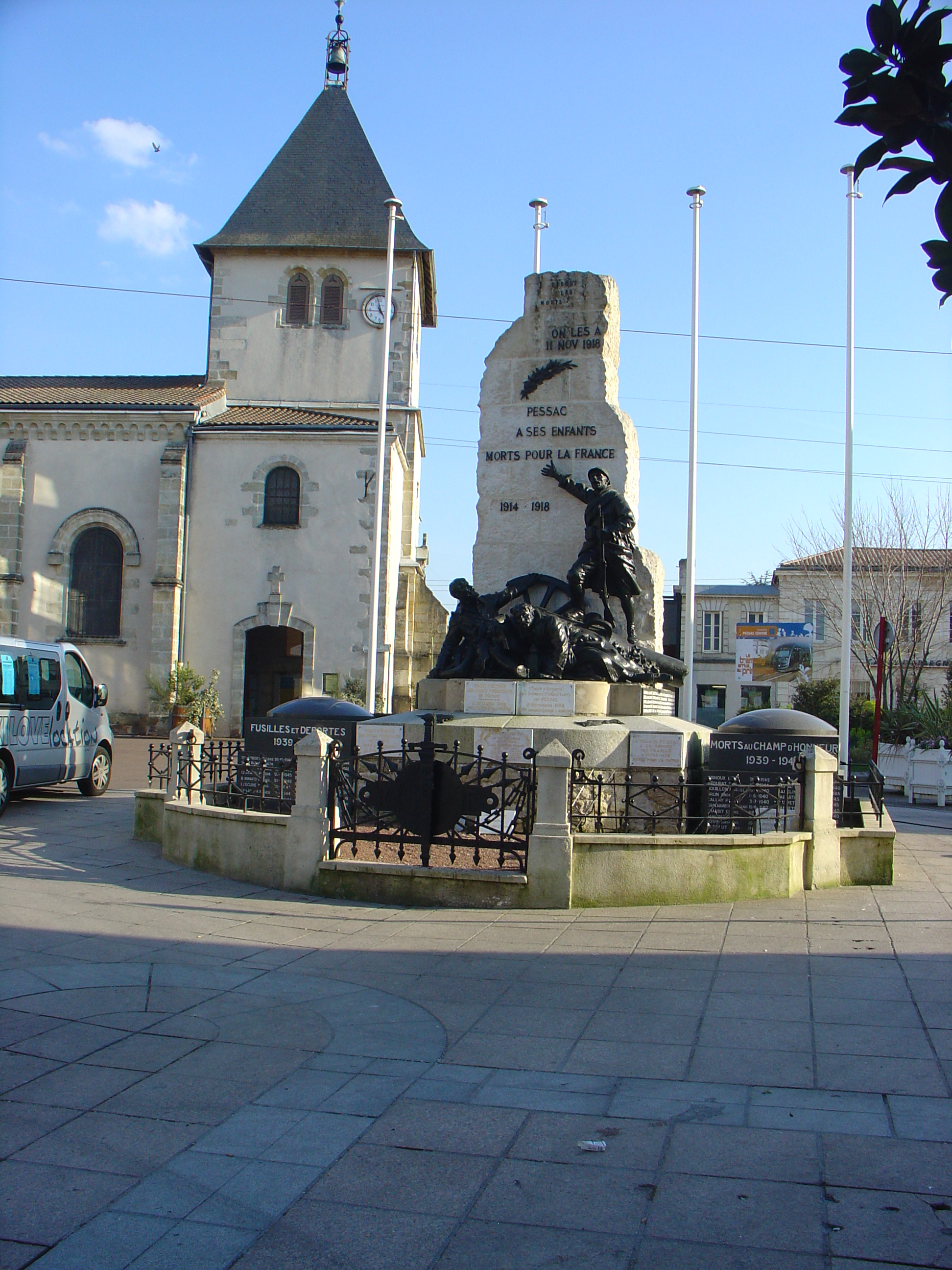 Photo de l'église Saint Martin et du monument aux morts à Pessac prise en mars 2007 par Carmen Buze